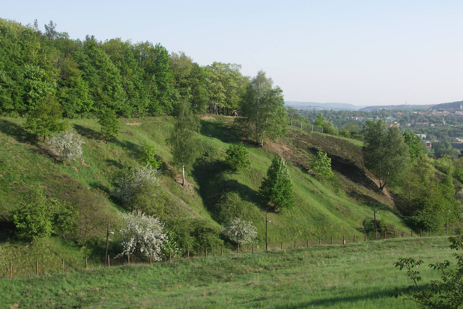 Přírodní rezervace Salabka, Praha, Czech Republic Jiří Vackář 20:30, 10 May 2006 (UTC)